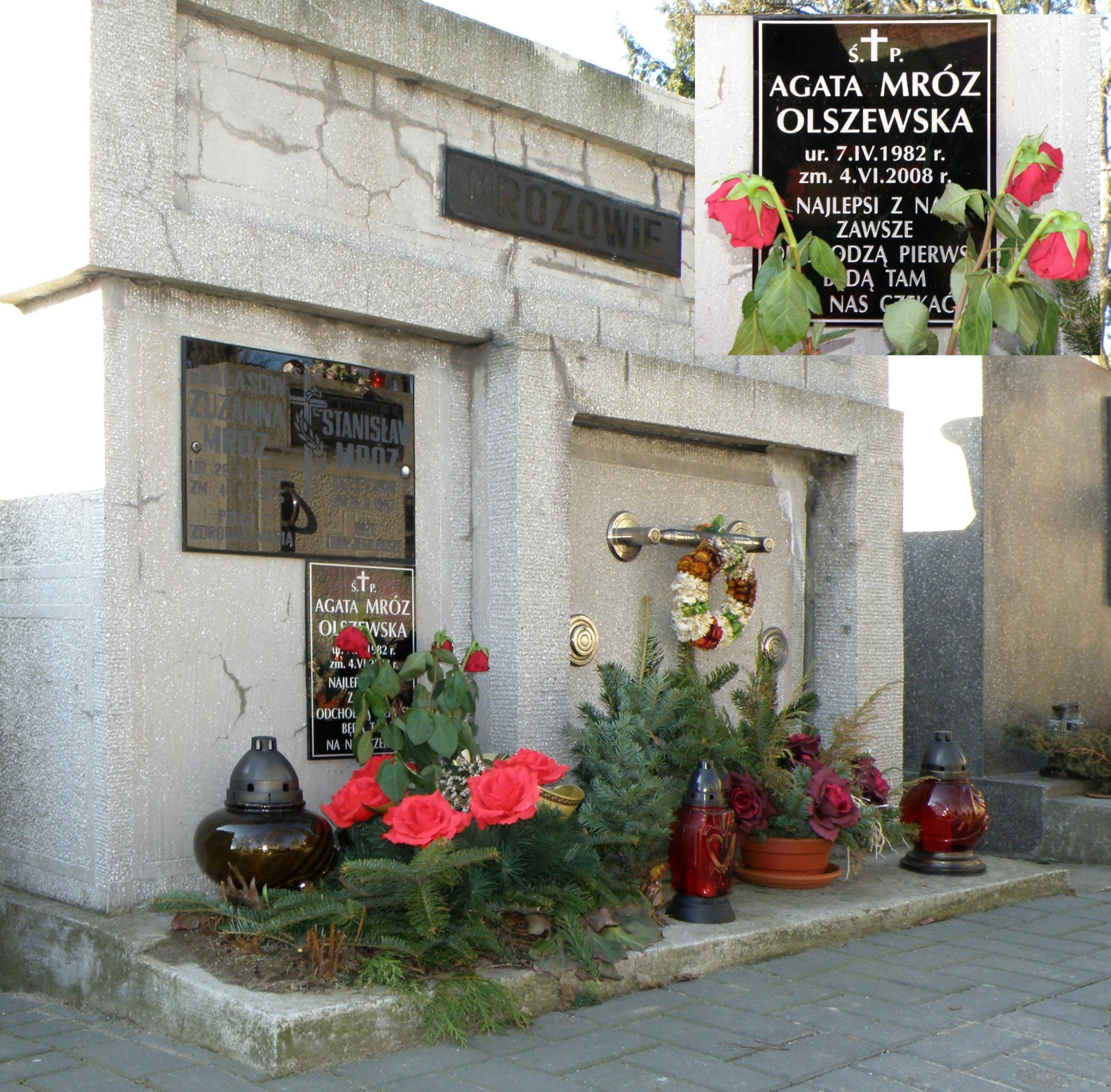 Grób Agaty Mróz-Olszewskiej na cmentarzu komunalnym w Tarnowie w dzielnicy Krzyż.